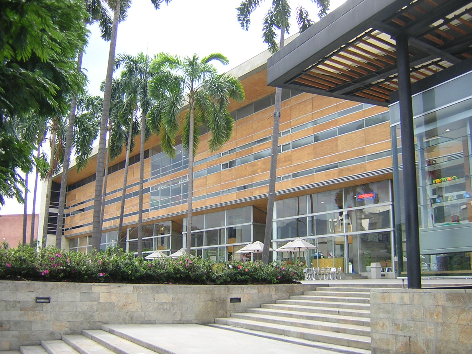 Museo Interactivo EPM, Medellín, Colombia